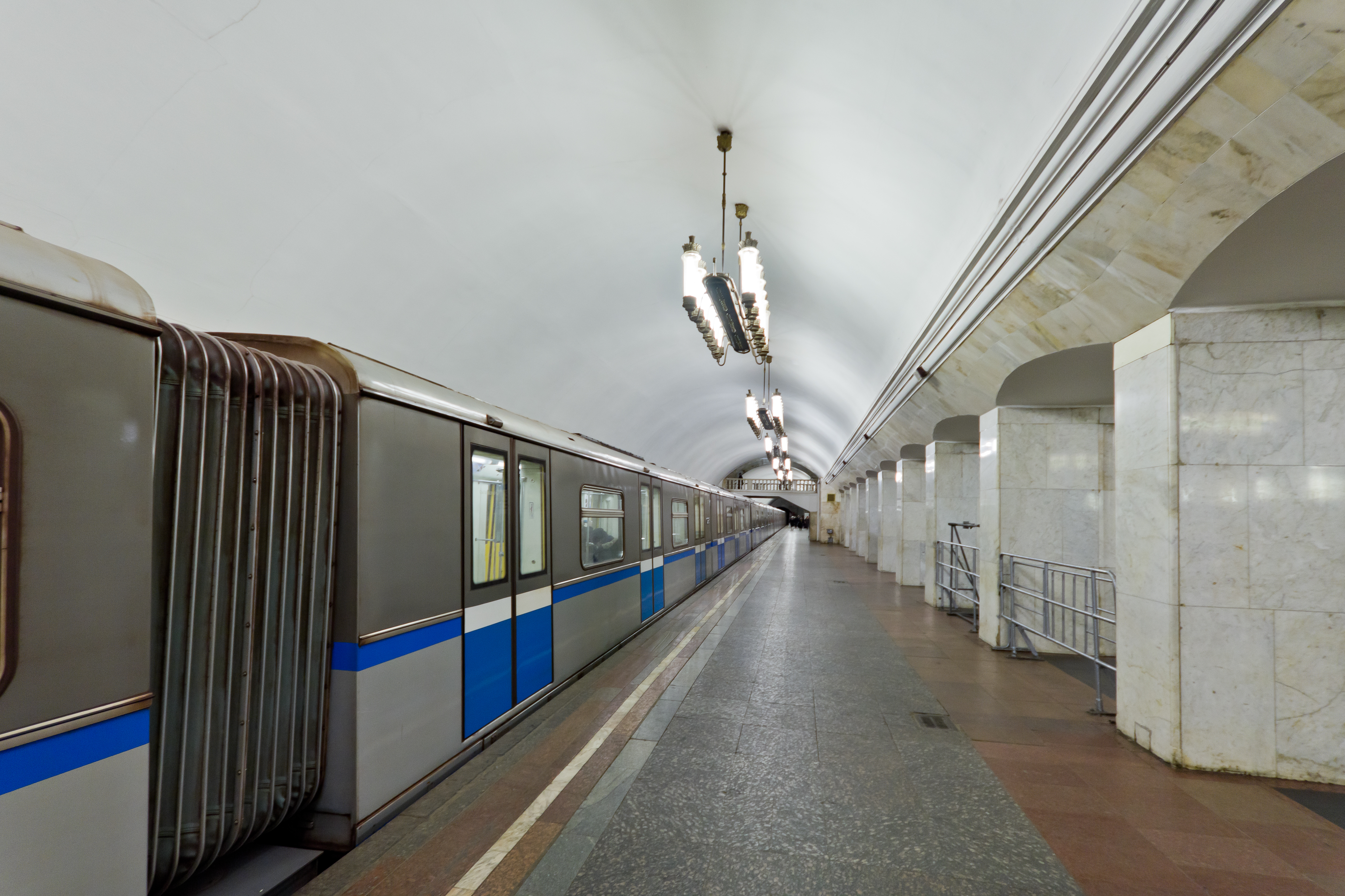 Курская (станция метро, Кольцевая линия)